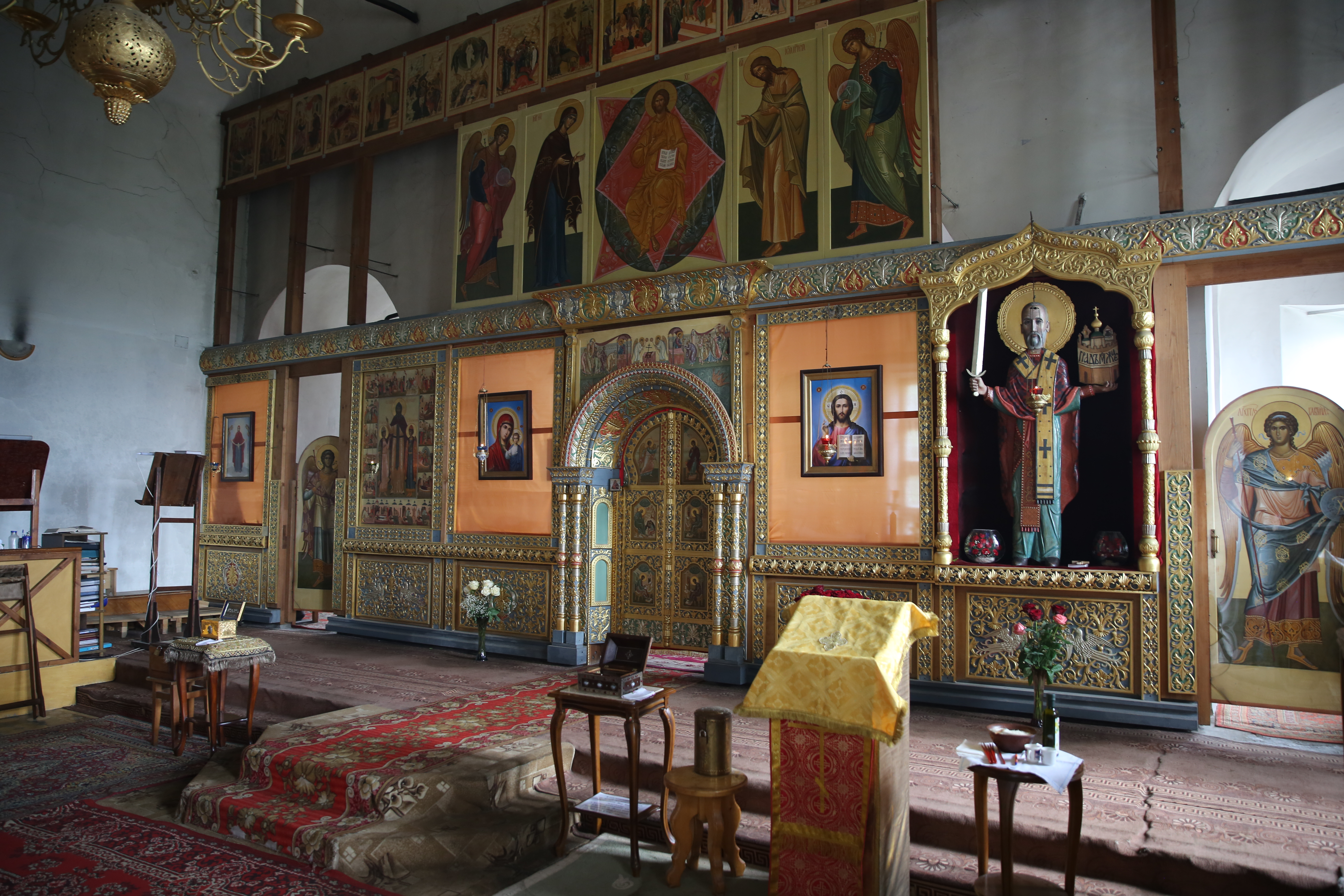 Собор Ново-Никольский: улица Бородинская, 9, Можайск, Можайский район, Московская область